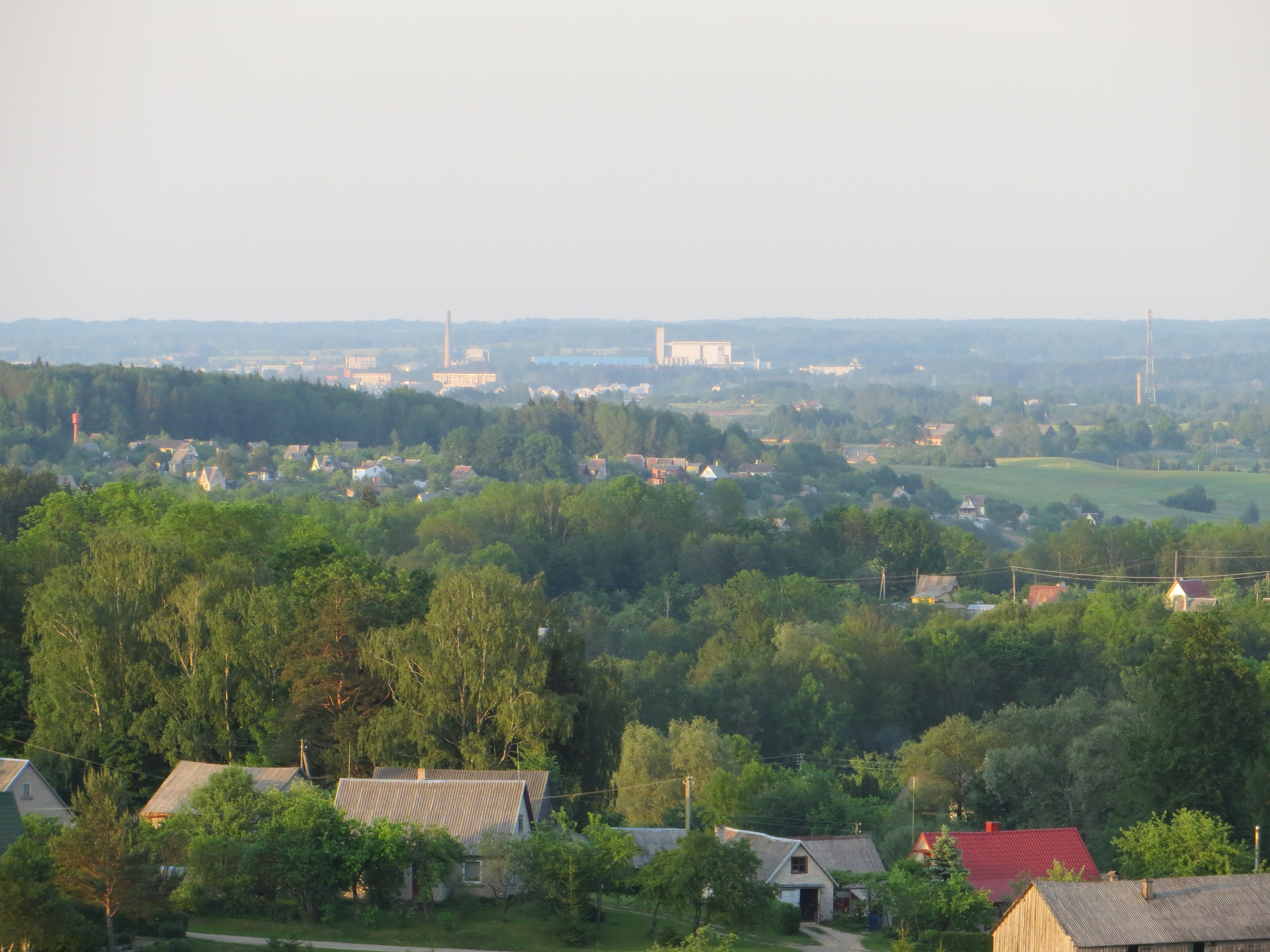 Utenėlė, Lithuania